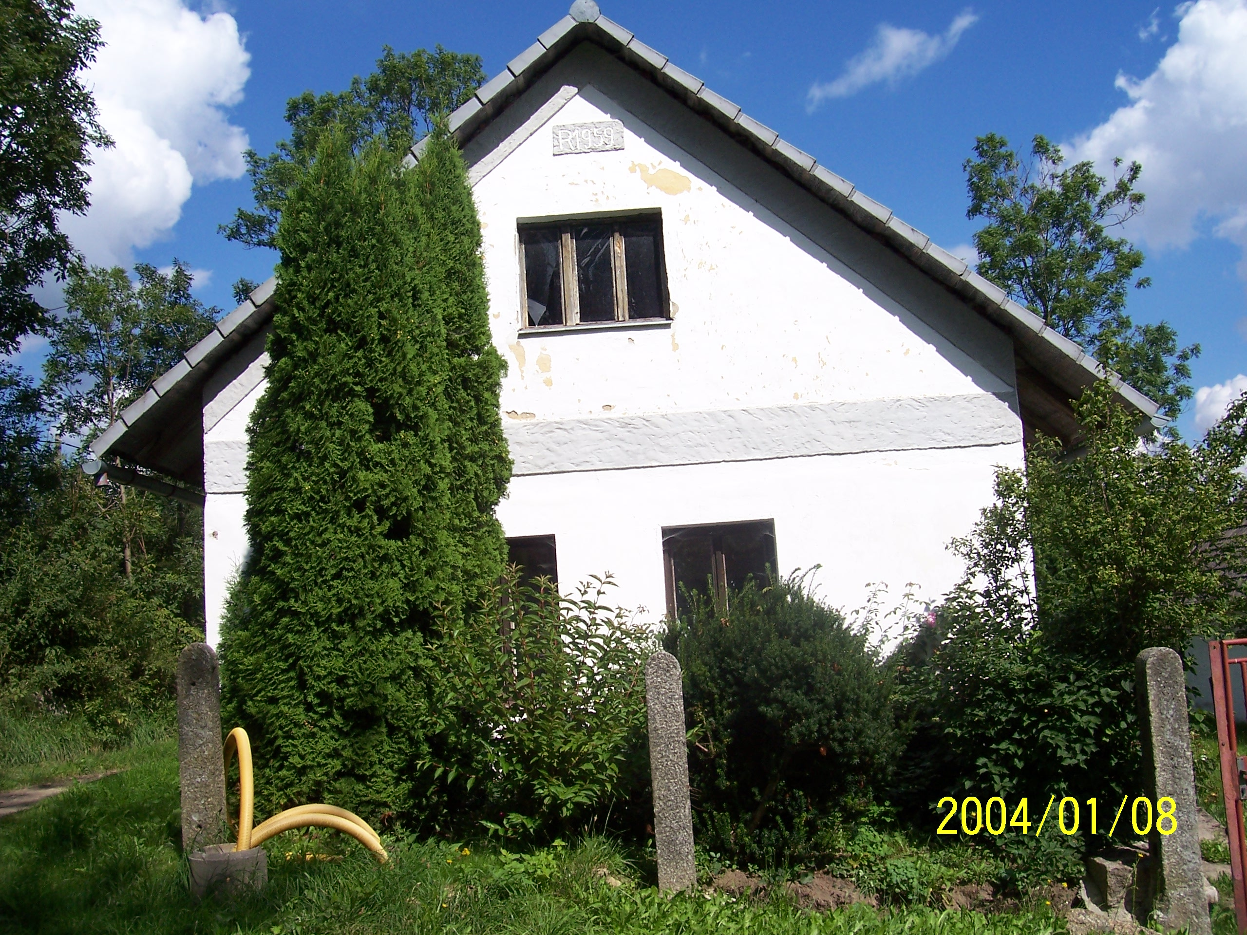 Nepřejov je osada, část obce Nadějkov v okrese Tábor. Česká republika.